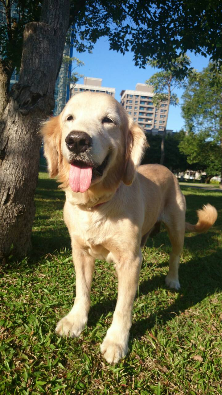 一隻名叫肥肥的黃金獵犬開心模樣